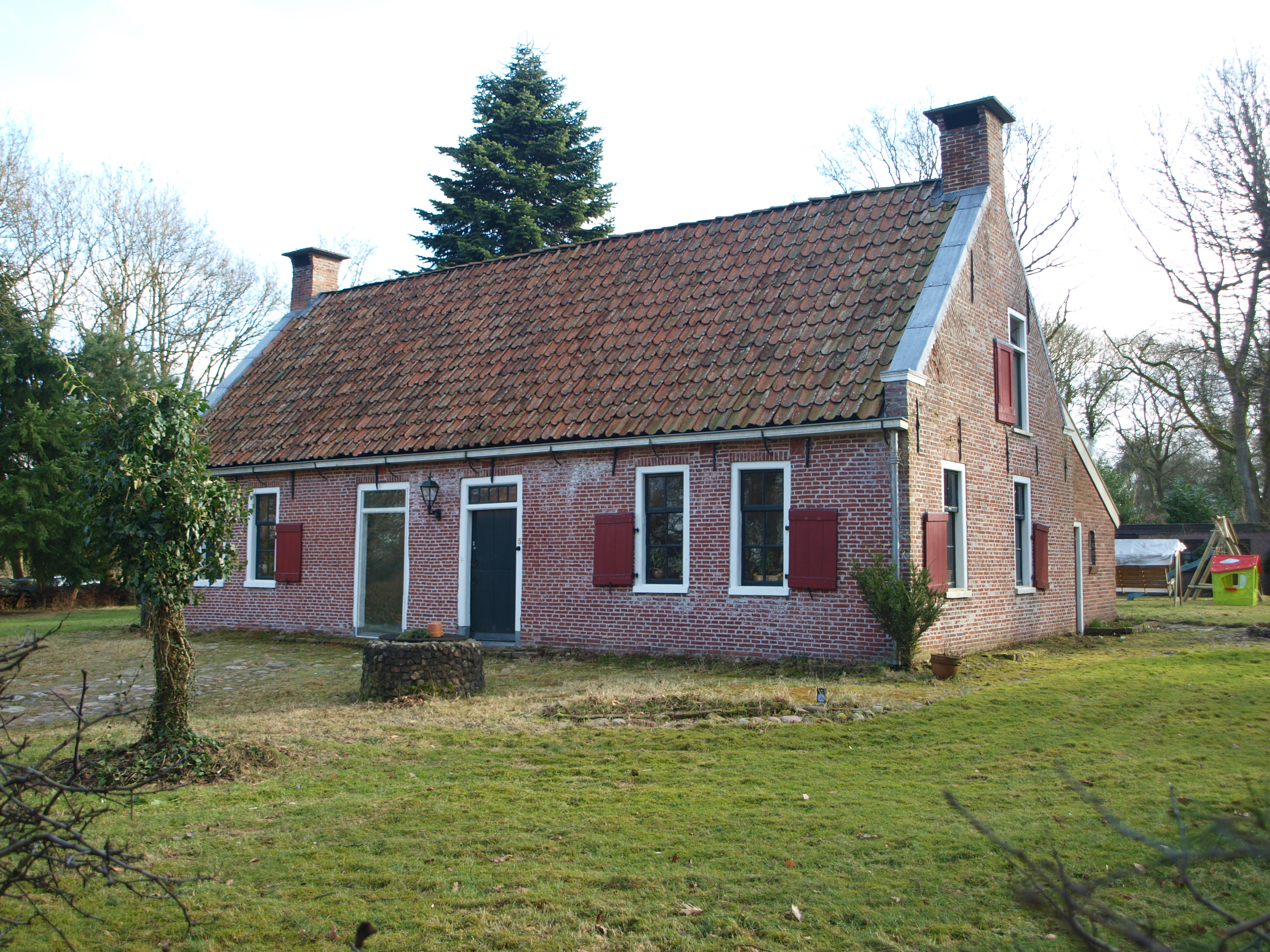 Glimmen Hoge-Hereweg 5 Sarieshut